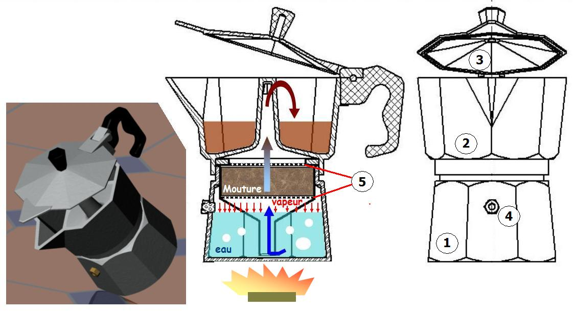 Image réalisée avec différents logiciels (word, solidworks, MS paint) Principe de la cafetière italienne. Cuve contenant l'eau contact avec la source de chaleur. Verseuse récupérant le breuvage Couvercle (doit être fermé pendant la montée du café : éclaboussures) Soupape de sécurité (donne aussi le niveau maximal d'eau dans la cuve) Grilles retenant la mouture. Principe: l'eau dans la cuve s'évapore en chauffant. La vapeur sous pression pousse le liquide qui remonte dans la crépine. Le passage forcé à travers la mouture favorise la dillution des composants aromatiques. En continuant à monter, le liquide déborde en haut de la cheminée et retombe dans la verseuse dont le volume admissible est compatible avec celui de la cuve. En général il reste un peu d'eau au fond de la cuve, souvent impreignée de café. Il s'agit du volume tampon contenu dans la cheminée qui ne peut pas être expulsé. auteur: Ruizo (2006) Catégorie:café